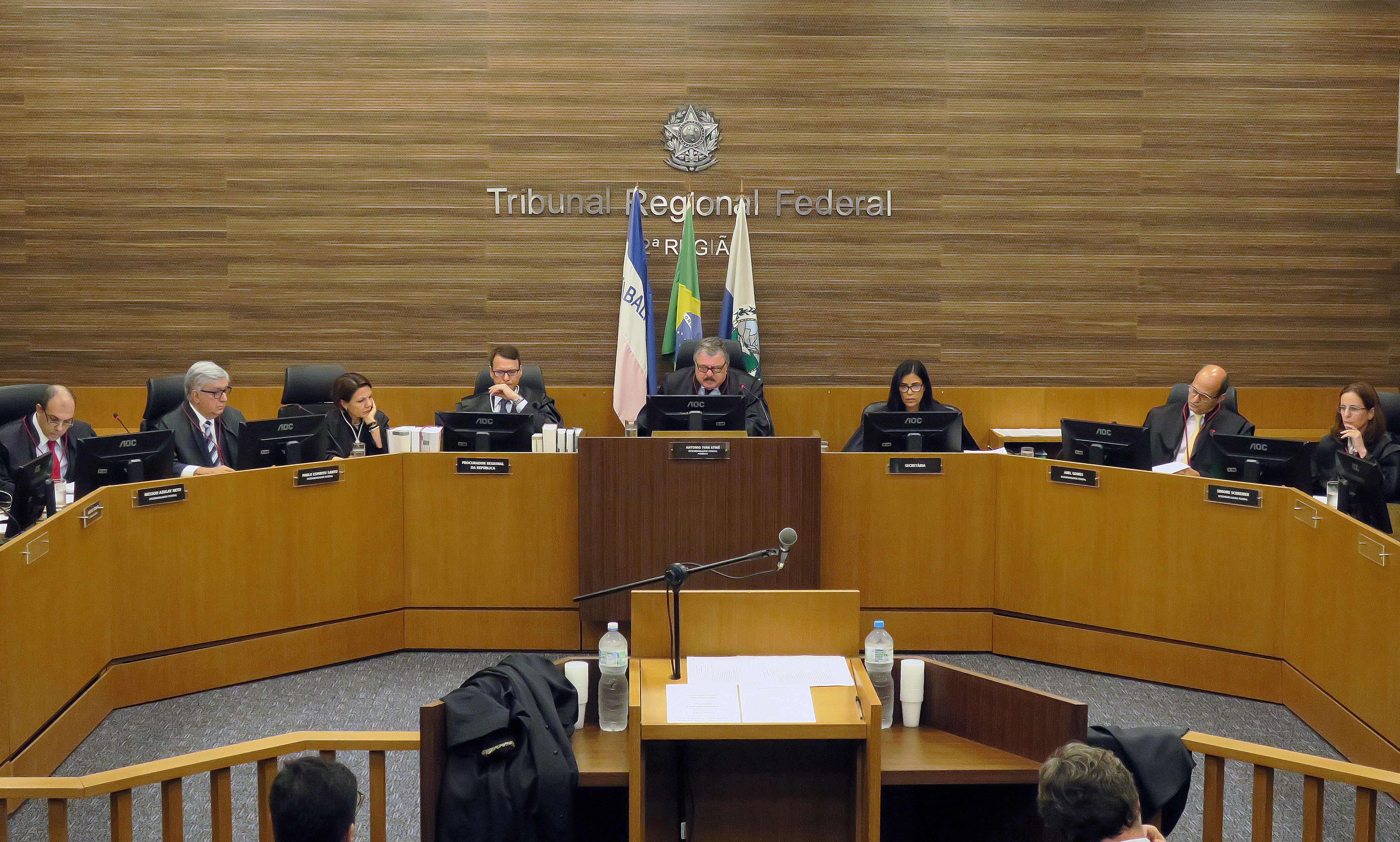 Rio de Janeiro - Tribunal Regional Federal da 2ª Região determina, por unanimidade, retorno de Picciani, Melo e Albertassi à prisão (Vladimir Platonow/Agência Brasil)